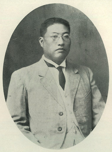 Bân-lâm-gú: N̂g Him 黃欣